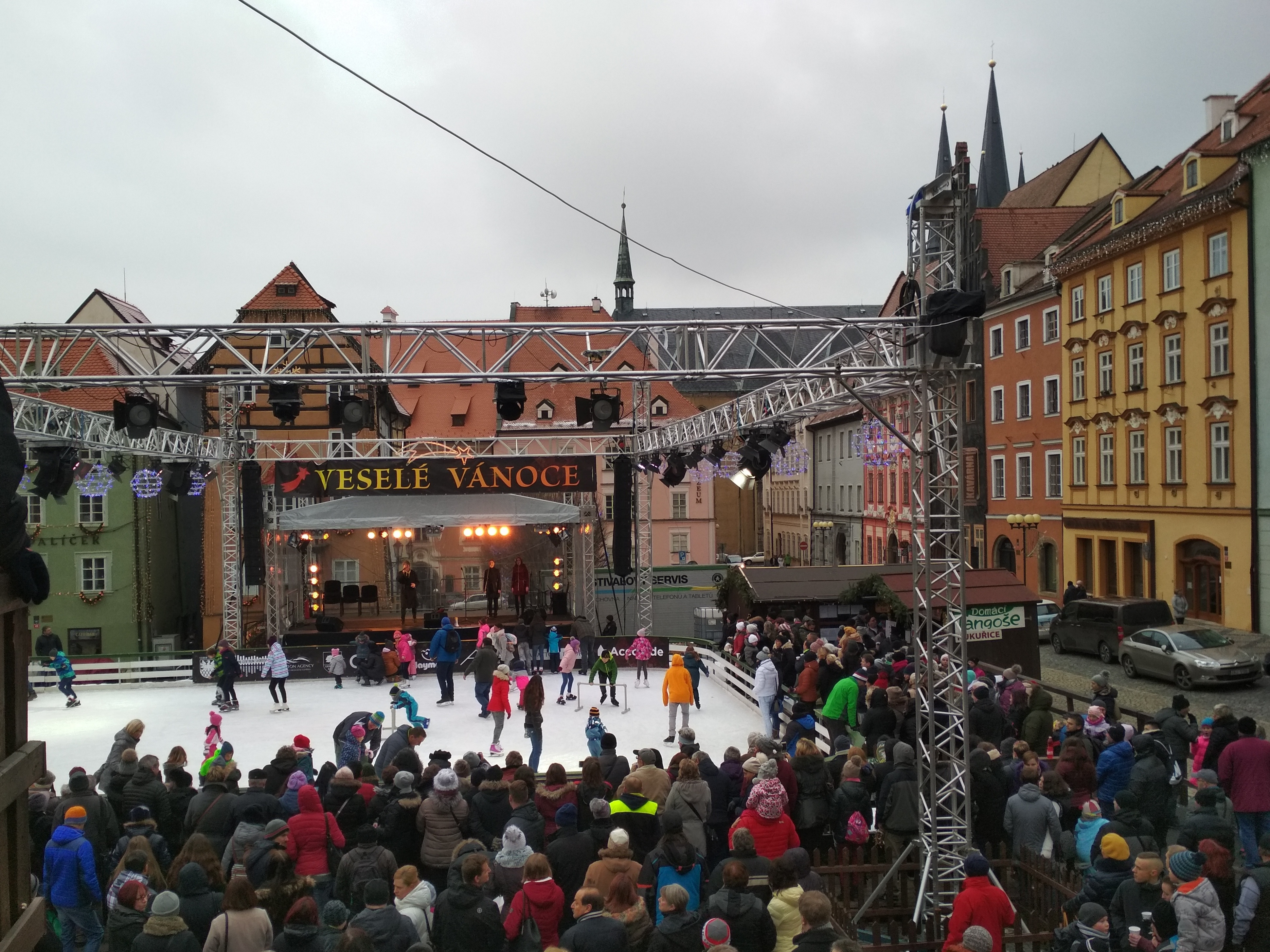 Vánoční trhy v Chebu.